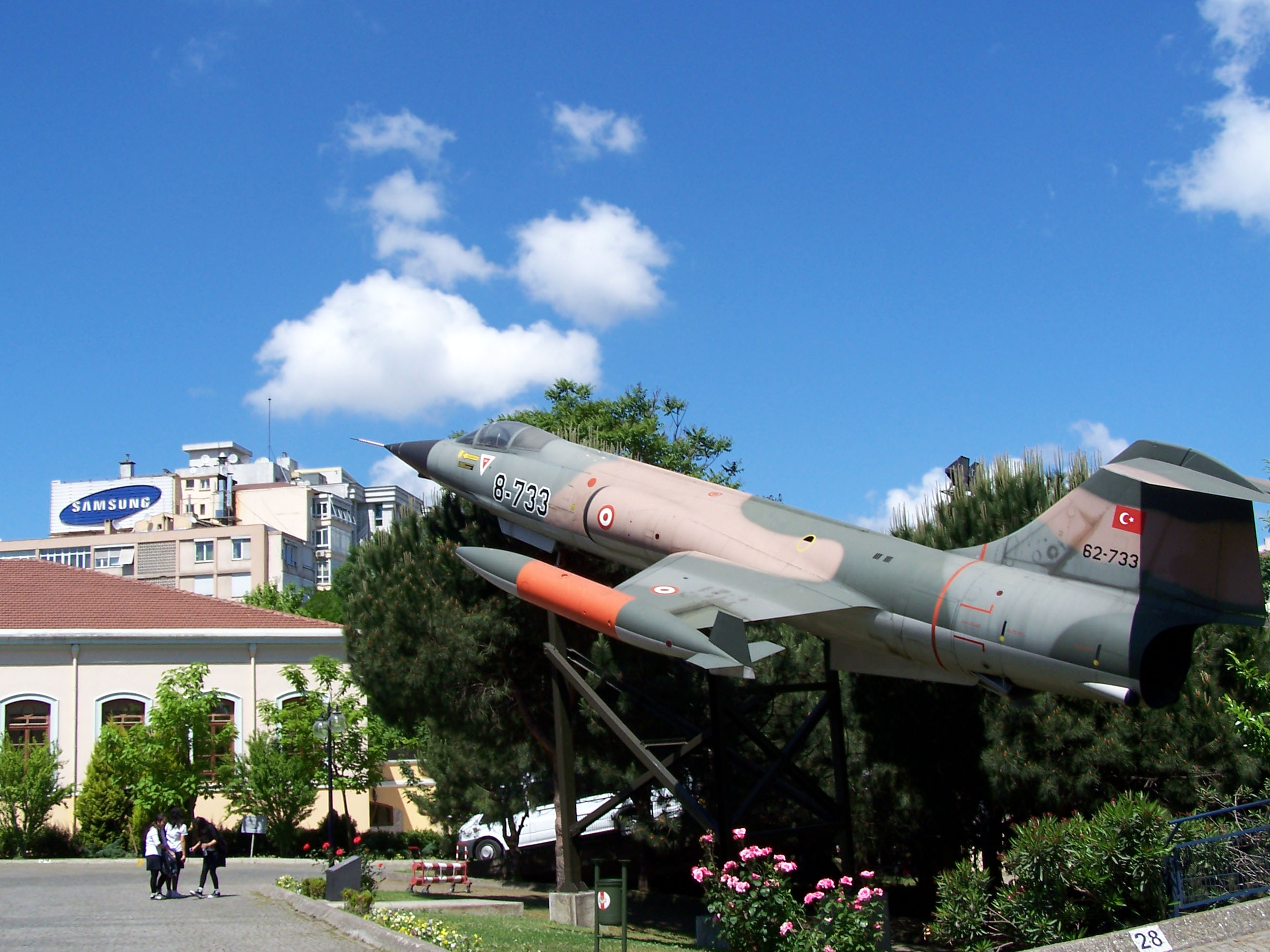 F-104 Starfighter in Askeri Müzesi (Military Museum) in Şişli, İstanbul, Turkey